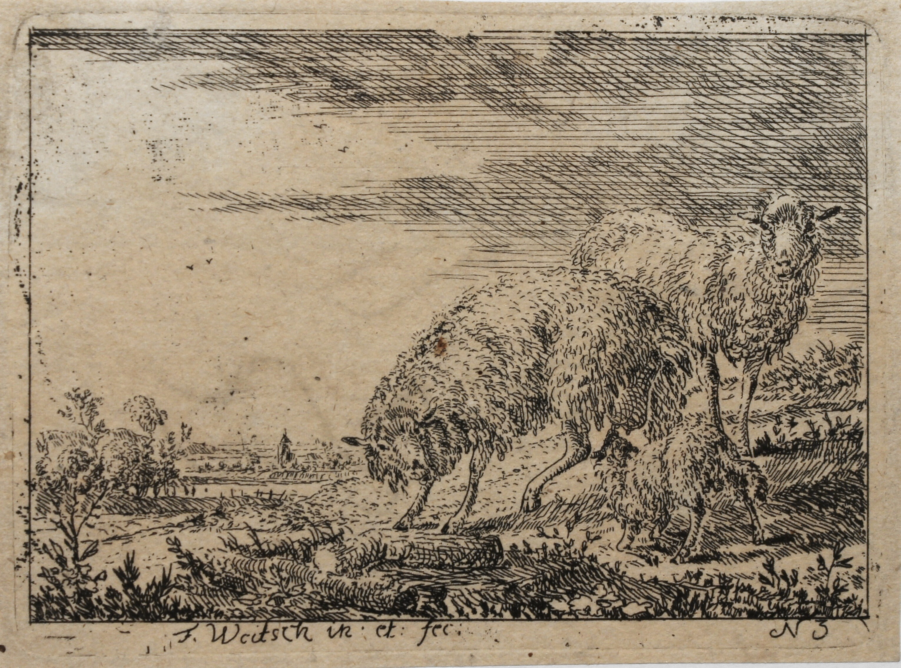 Pascha Johann Friedrich Weitsch, Schafe, Radierung Nr. 3 von 11, Entstehung 1766, (Privatbesitz, ein weiteres Exemplar befindet sich im Besitz des Herzog-Anton-Ulrich-Museums Braunschweig)